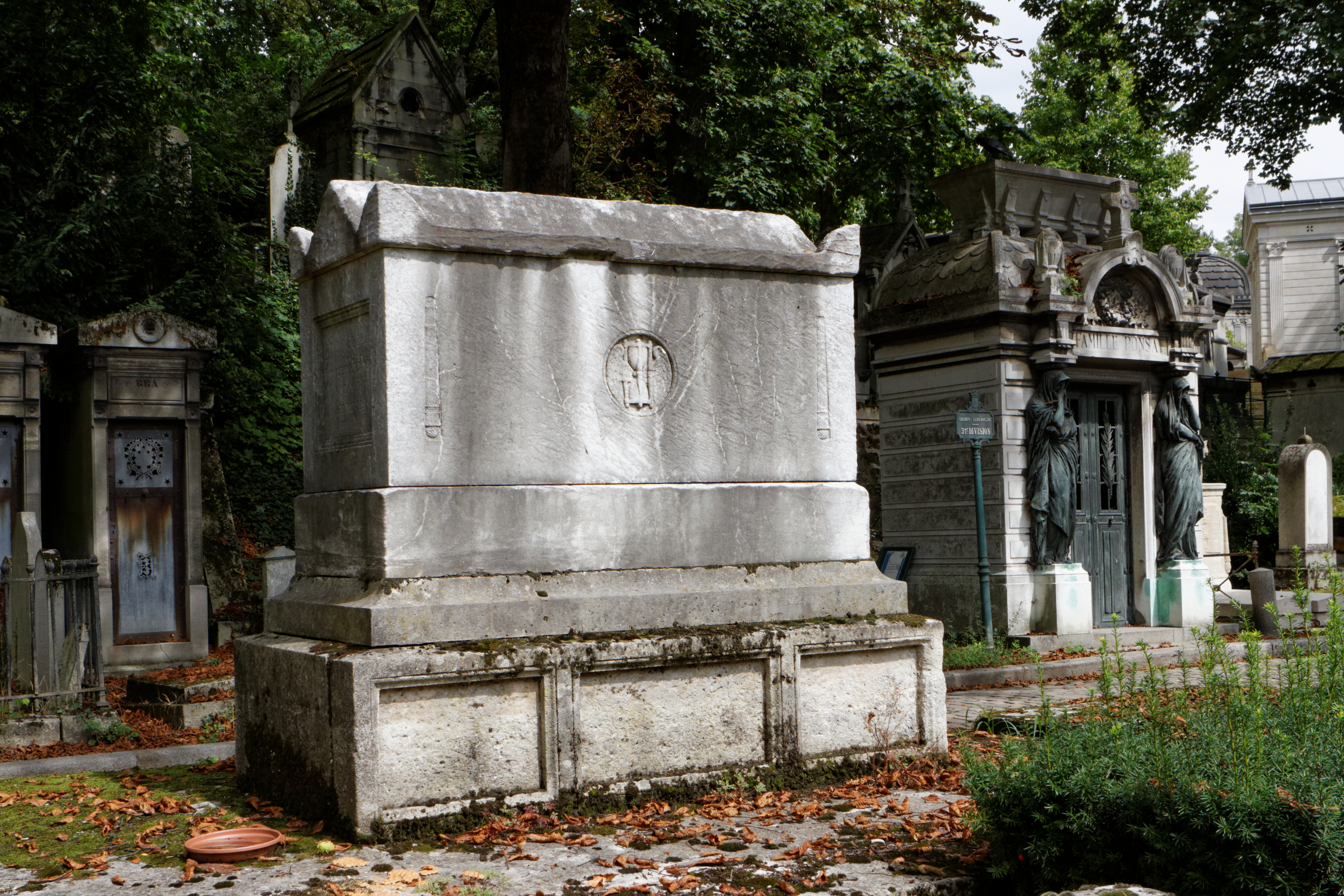 Sarcophage en marbre blanc du baron Claude-Philibert-Édouard Mounier (1783-1843).